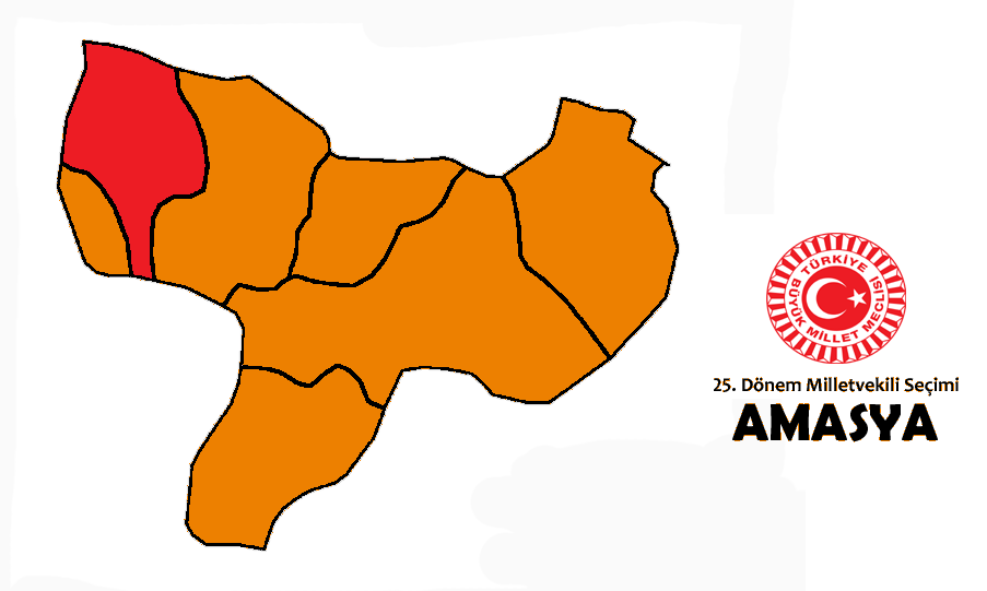 2015 genel seçim sonuçları